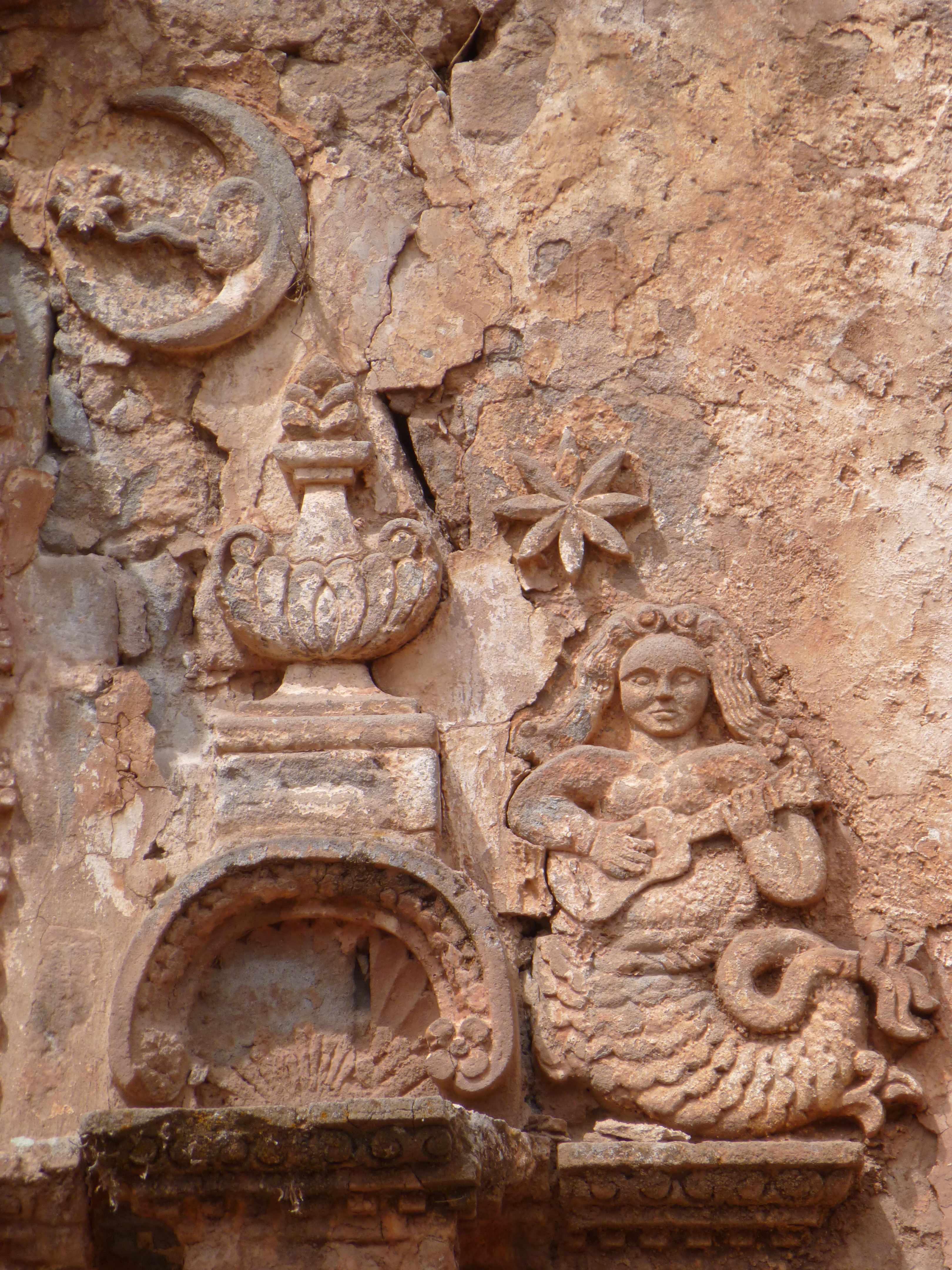 Templo de Salinas de Yocalla This medium shows the protected monument with the number P/00-074 in Bolivia.